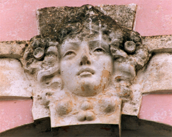 Mascherone di casa Napoli in via Rettifilo ad Alliste (Italia). I mascheroni erano un elemento decorativo (ed a volte anche apotropaico) di portali ed archi. Foto di Antonio47, 1986.